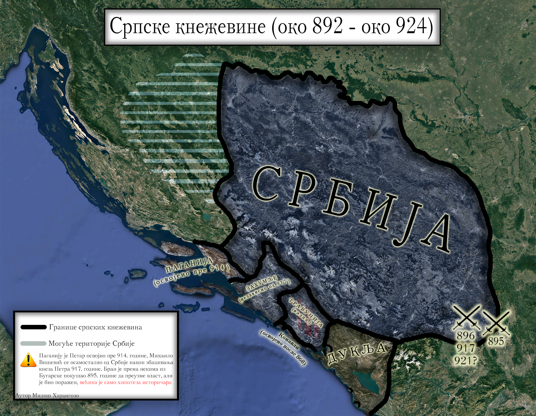 Српске кнежевине у 9. и 10. веку